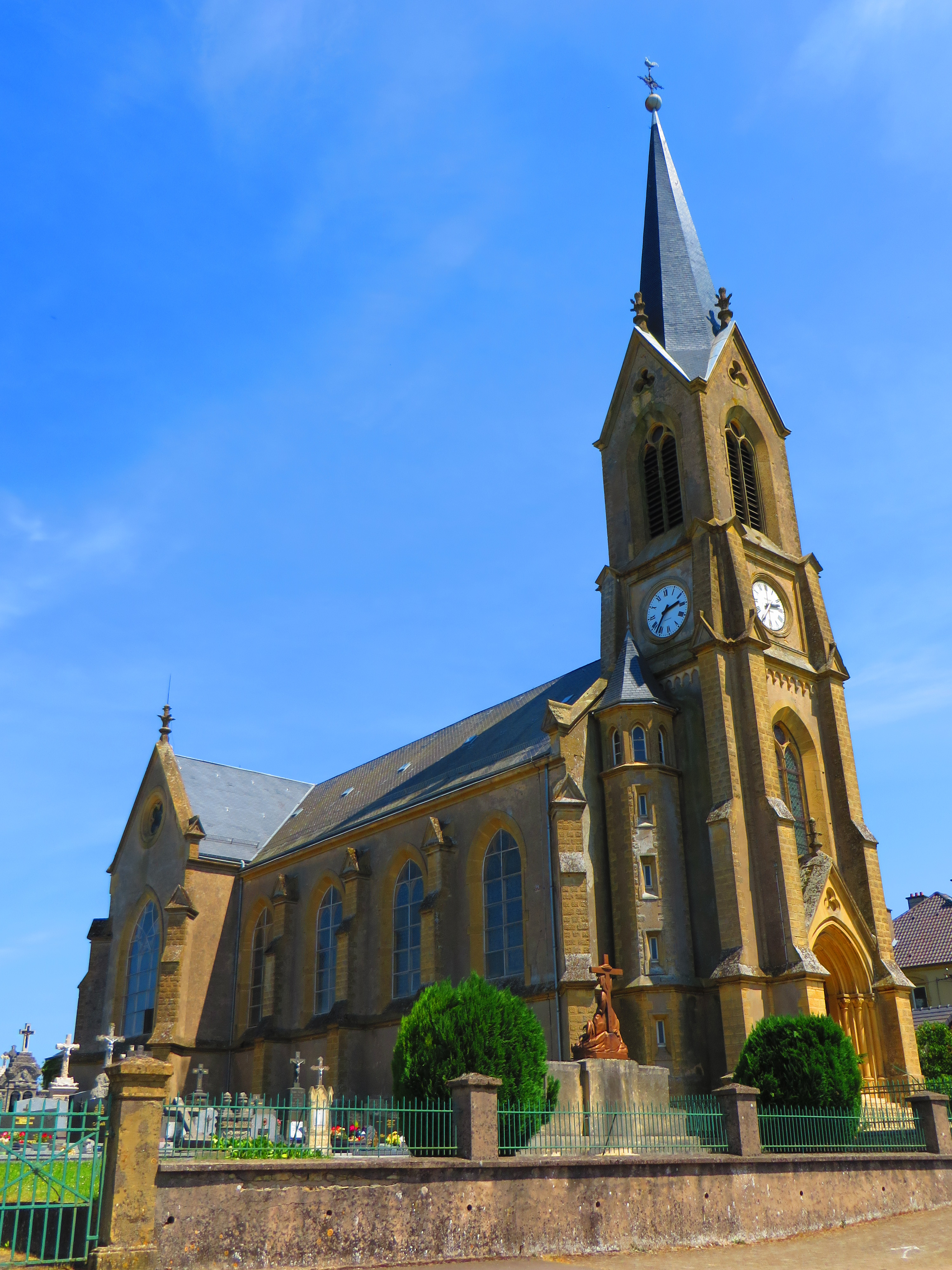 Halstroff eglise